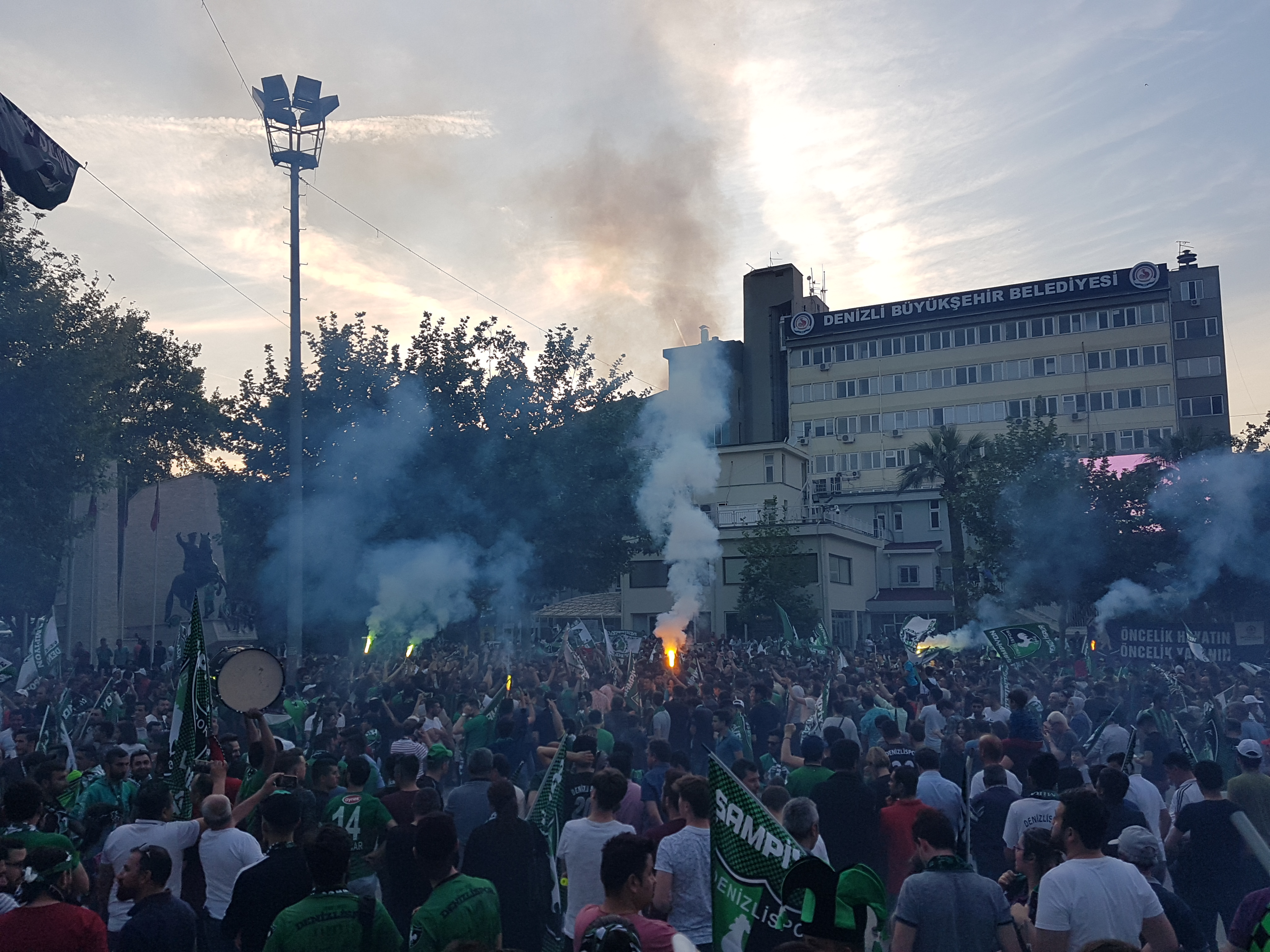 Denizlispor taraftarları